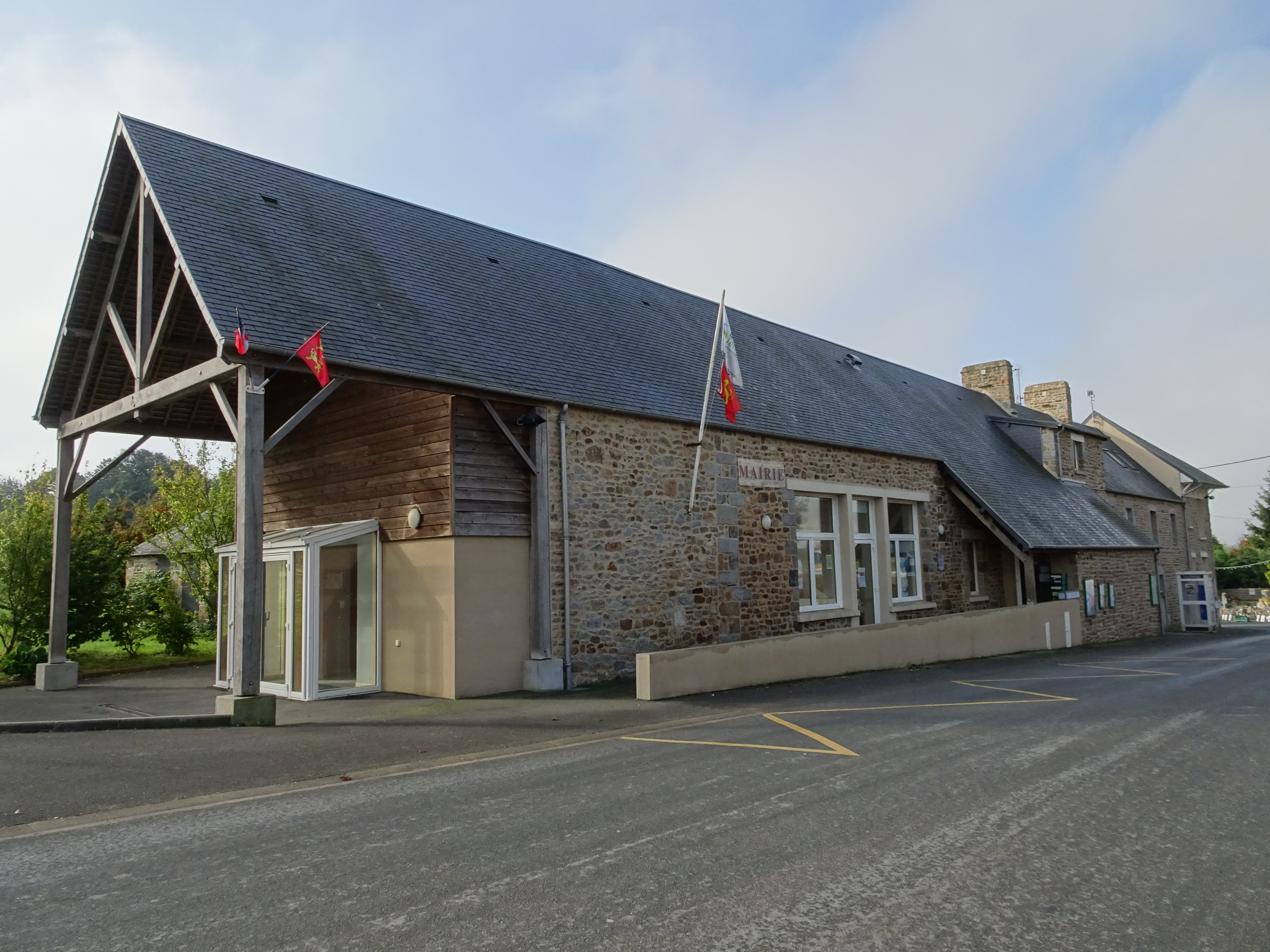 Champeaux, Manche, 2017